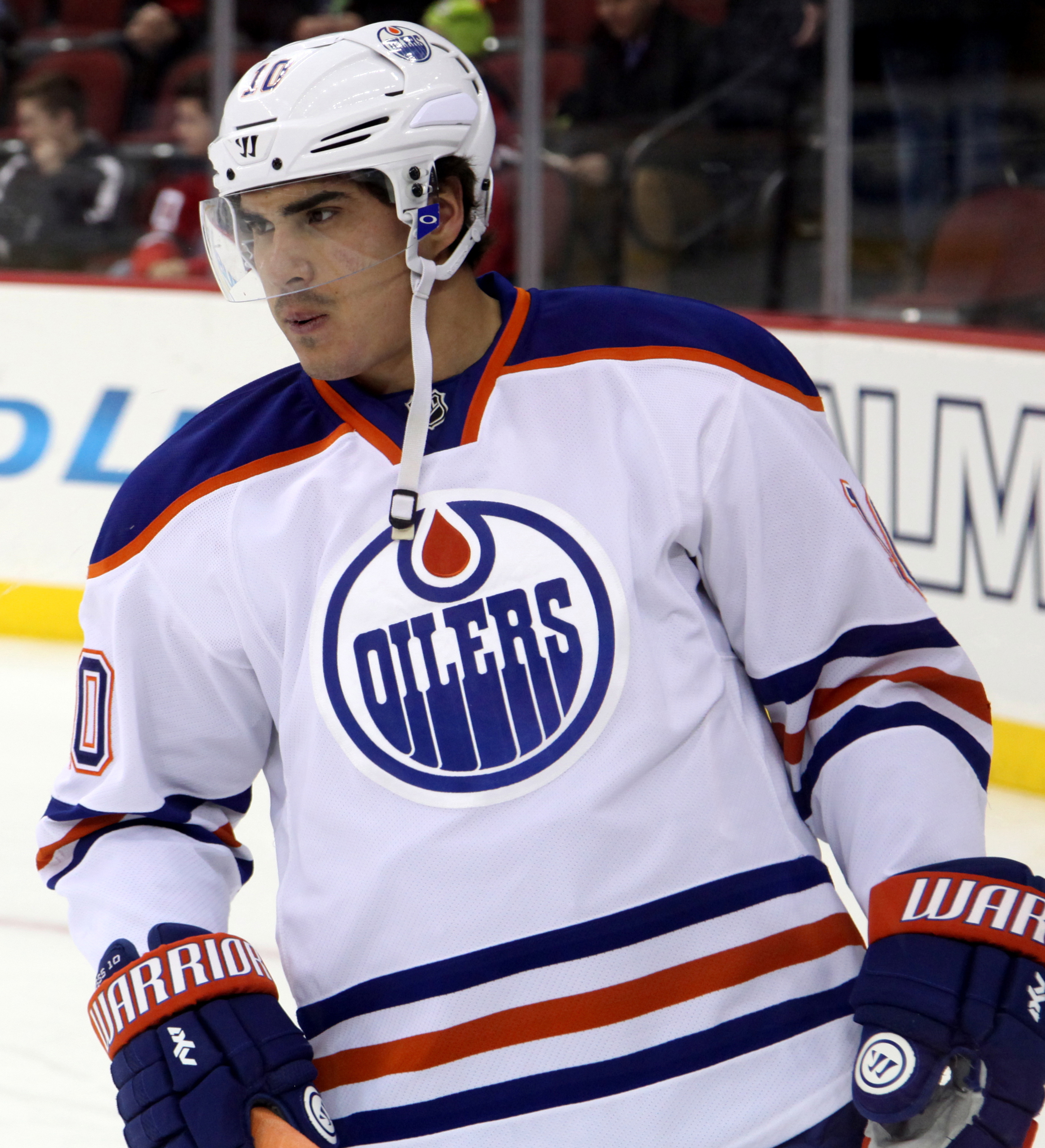 Yakupov in February 2015.